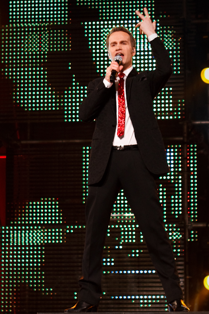 Alexander Stenerud